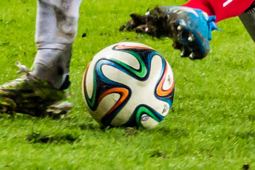 Piłka Adidas Brazuca Ekstraklasa wykorzystywana w T-Mobile Ekstraklasie w sezonie 2014/2015.